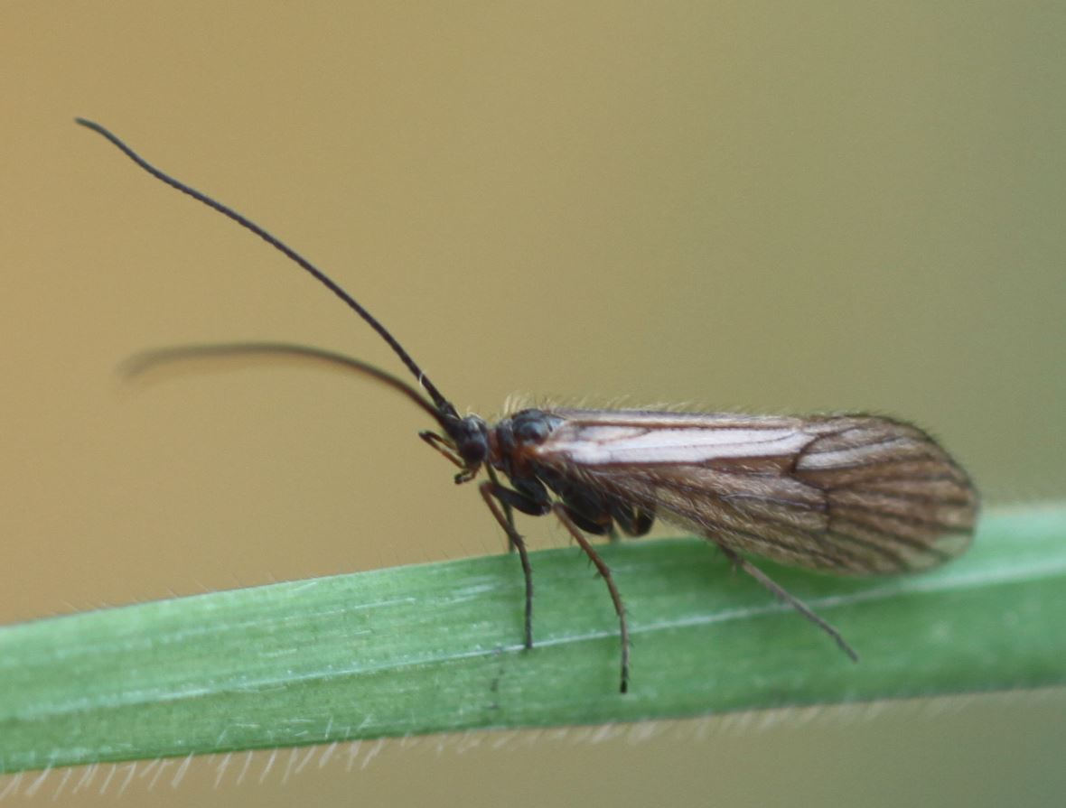 Köcherfliege Enoicyla pusilla am 27. Oktober 2018 in der Schwetzinger Hardt